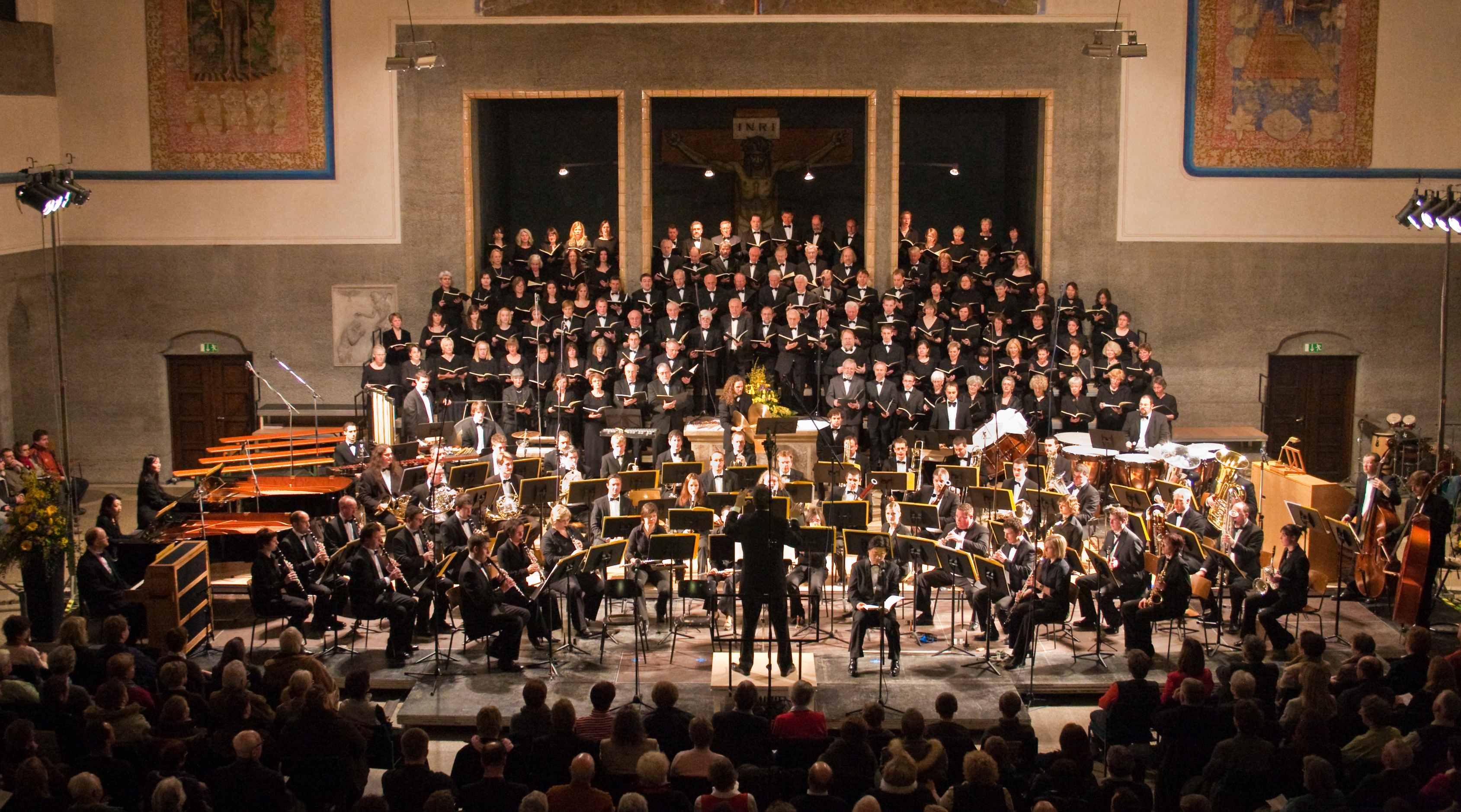 Pauluskirche in Ulm, Germany